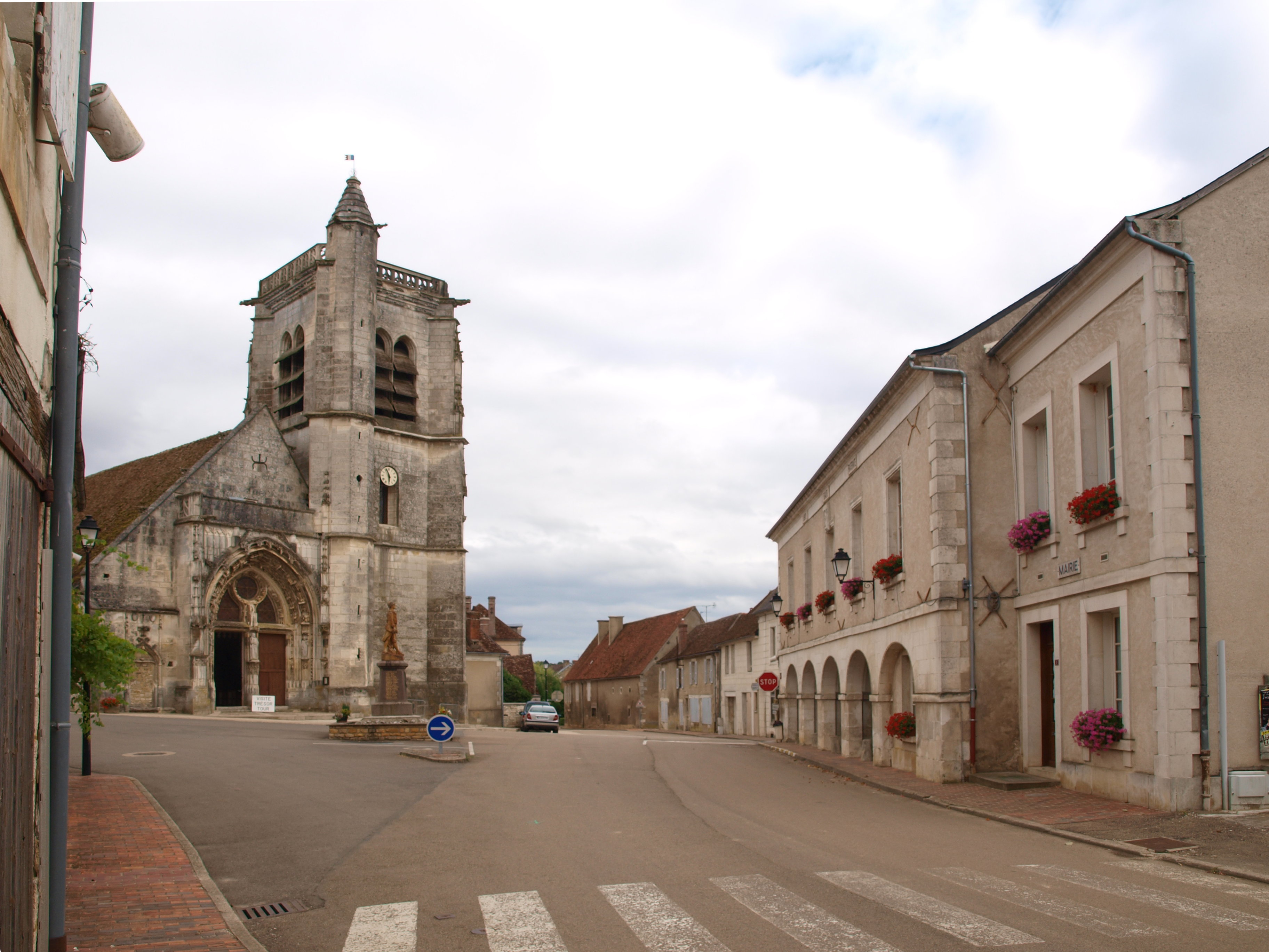 Thury (Yonne, France) , place de la mairie vue du sol